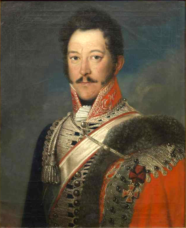 Aus noch unidentifierzierter Hand stammt dieses Ölgemälde wohl nach der Schlacht bei Waterloo und der Erhebung des vormaligen Kurfürstentums zum Königreich Hannover um 1815 geschaffene Ölgemälde eines noch unidentifizierten Künstlers. Es zeigt den Oberst des von dem Prinzregenten von Großbritannien, Irland und Hannover und späteren König Georg IV. 1813 gegründete Husarenenregiments und späteren hannoverschen Kriegsminister Ferdinand Graf von Kielmansegg. Das Brustbild in Öl auf Leinwand hat die Maße circa 67 cm x 56 cm ...